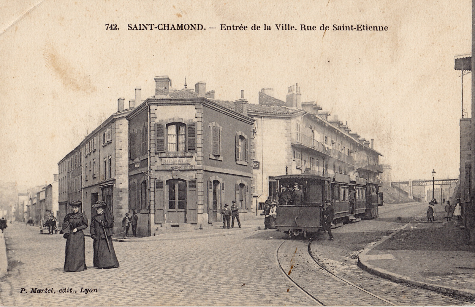 Carte postale ancienne éditée par Martel à Lyon, n°742 : SAINT-CHAMOND - Entrée de la Ville, Rue de Saint-Etienne